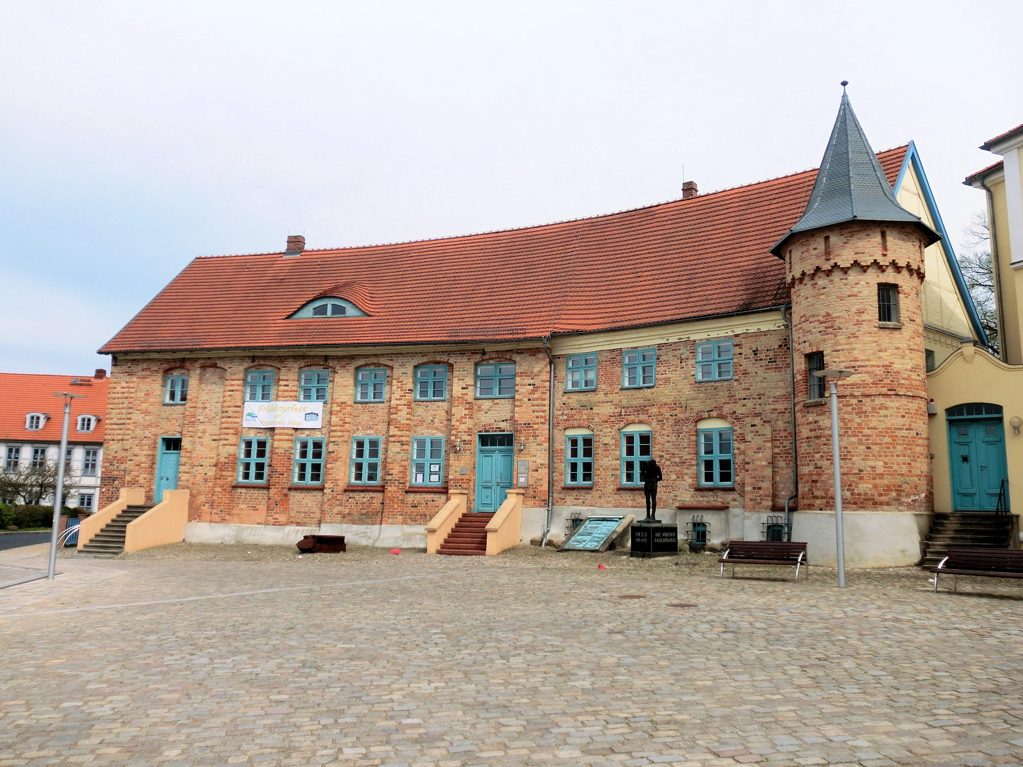 Bützow Schlossplatz 2, Krummes Haus, Museum